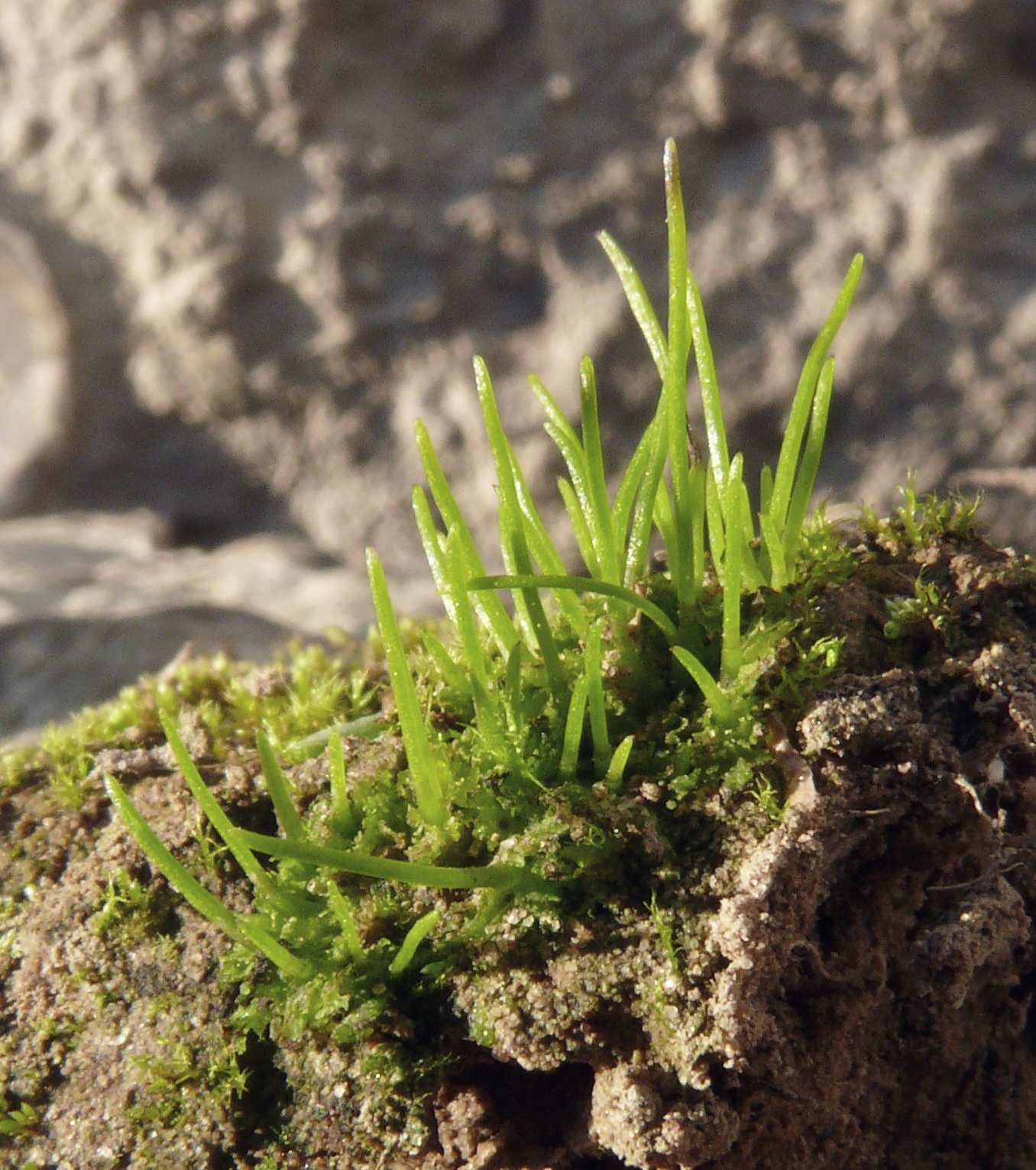 Anthoceros agrestis, Schwäbisch-Fränkische Waldberge, Deutschland